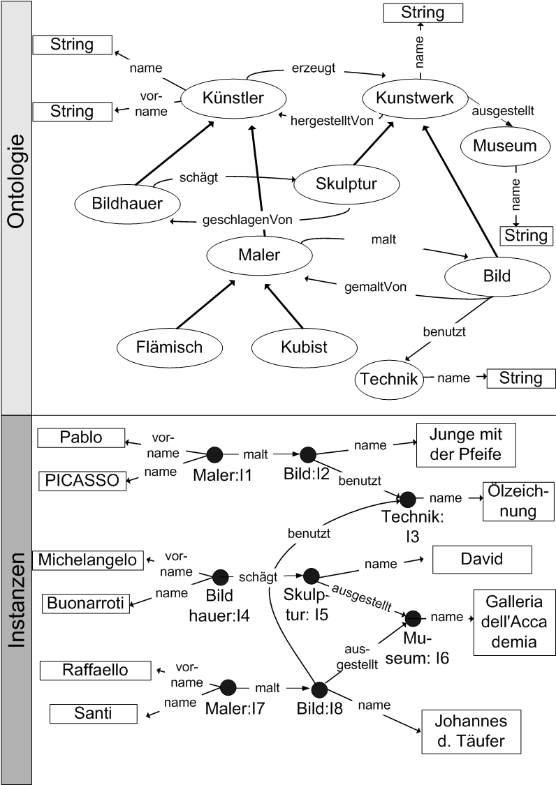 Ontologie eines Museums. Das Bild wurde für eine Abschlussarbeit eigenhändig erstellt. Es liegen keine Urheberrechte seitens einer Firma oder sonstiger Institutionen auf dem Bild.